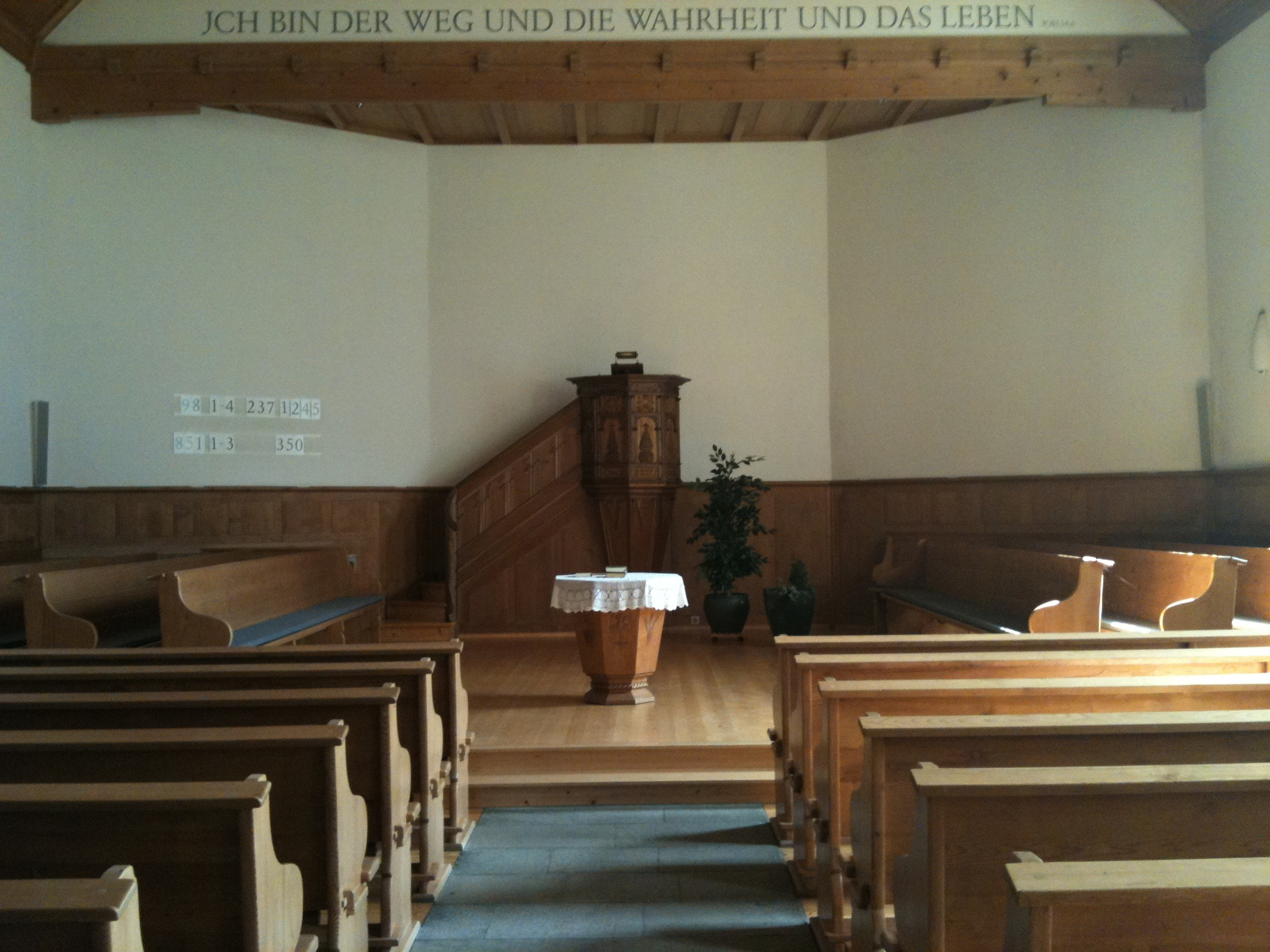 reformierte Kirche Grüsch, Kanton Graubünden